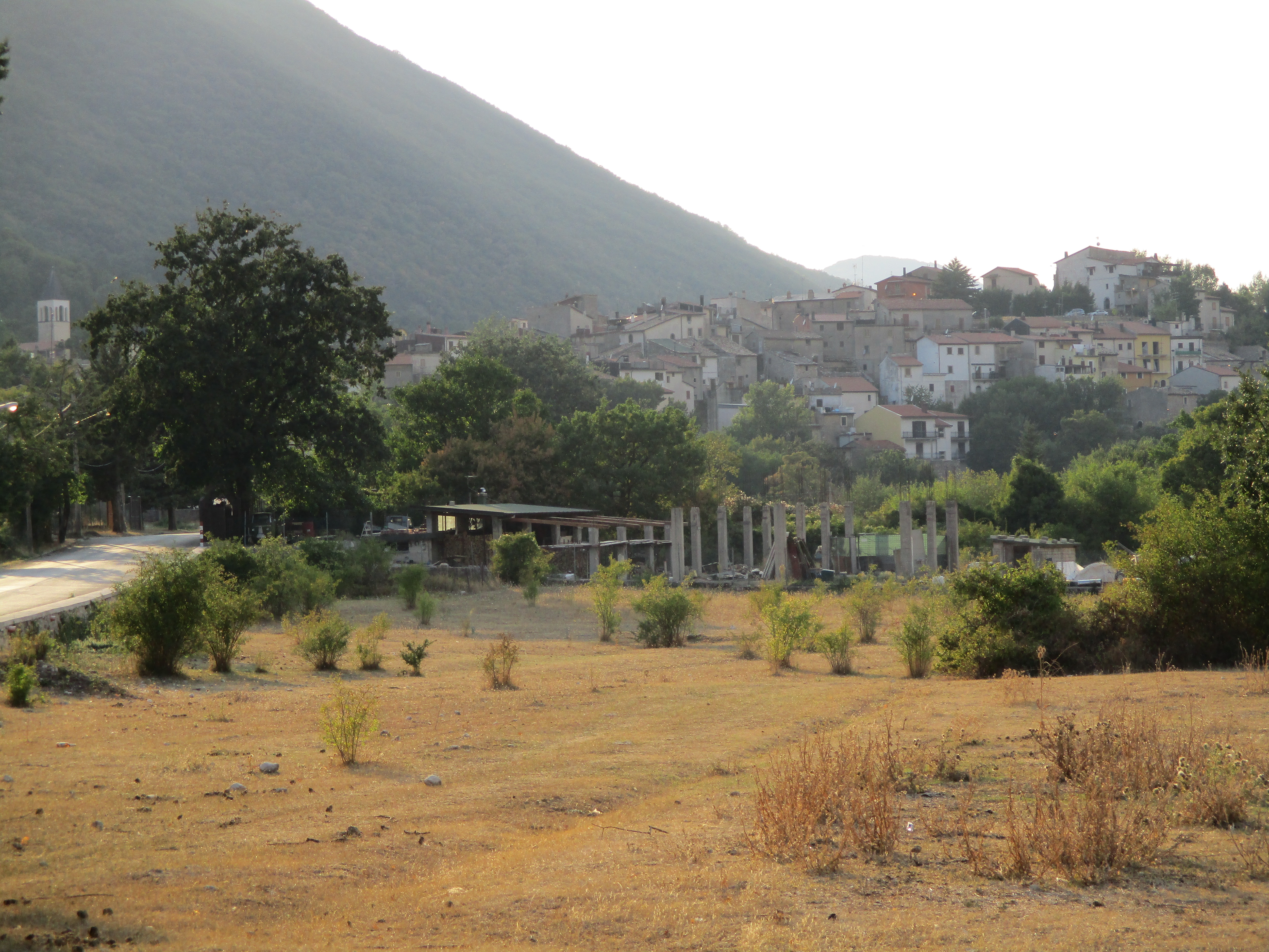 Spunto del borgo